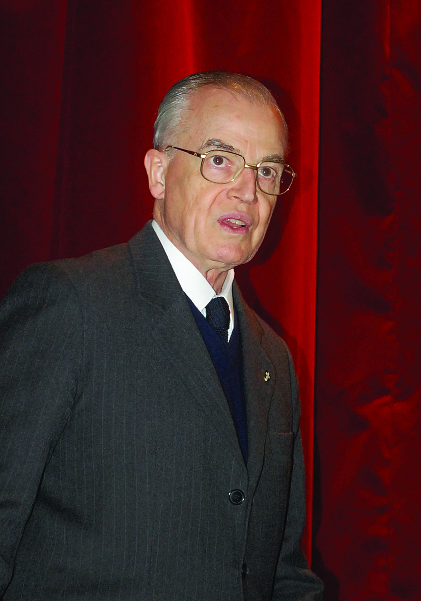 Príncipe Imperial do Brasil